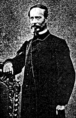 Bernard Alart